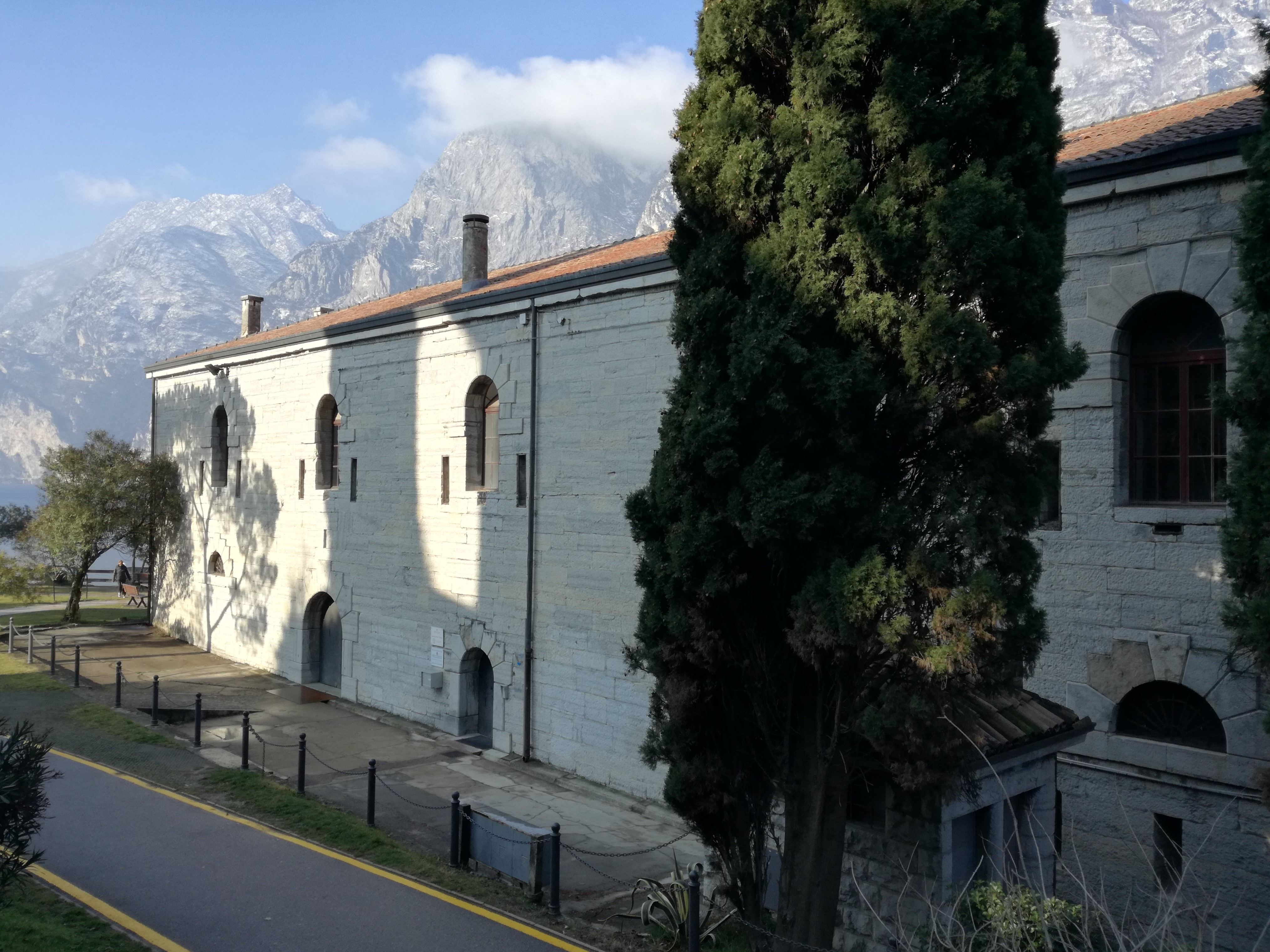 Batterie San Nicolò Ostseite